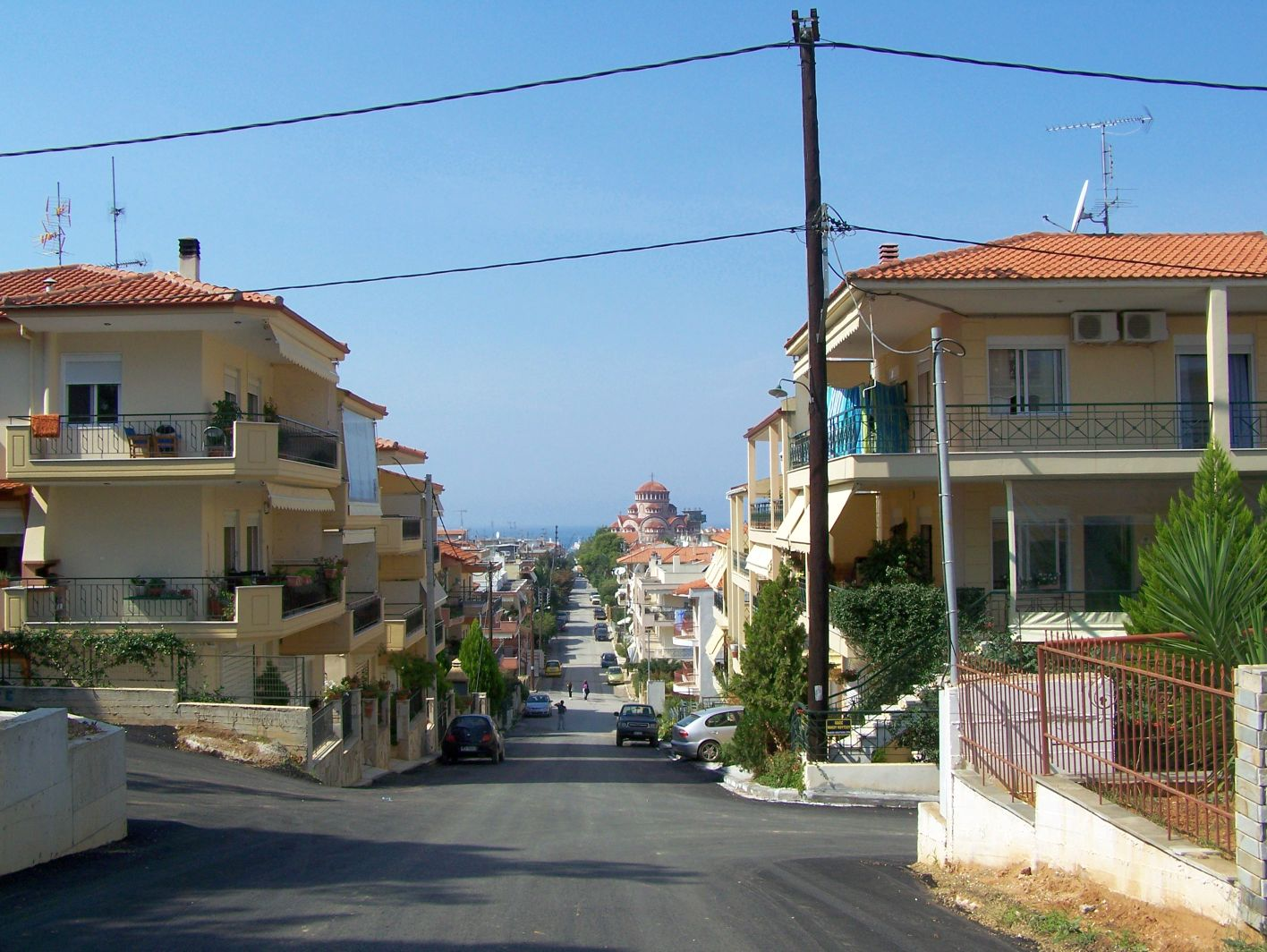 Anfahrt auf Nea Moudania